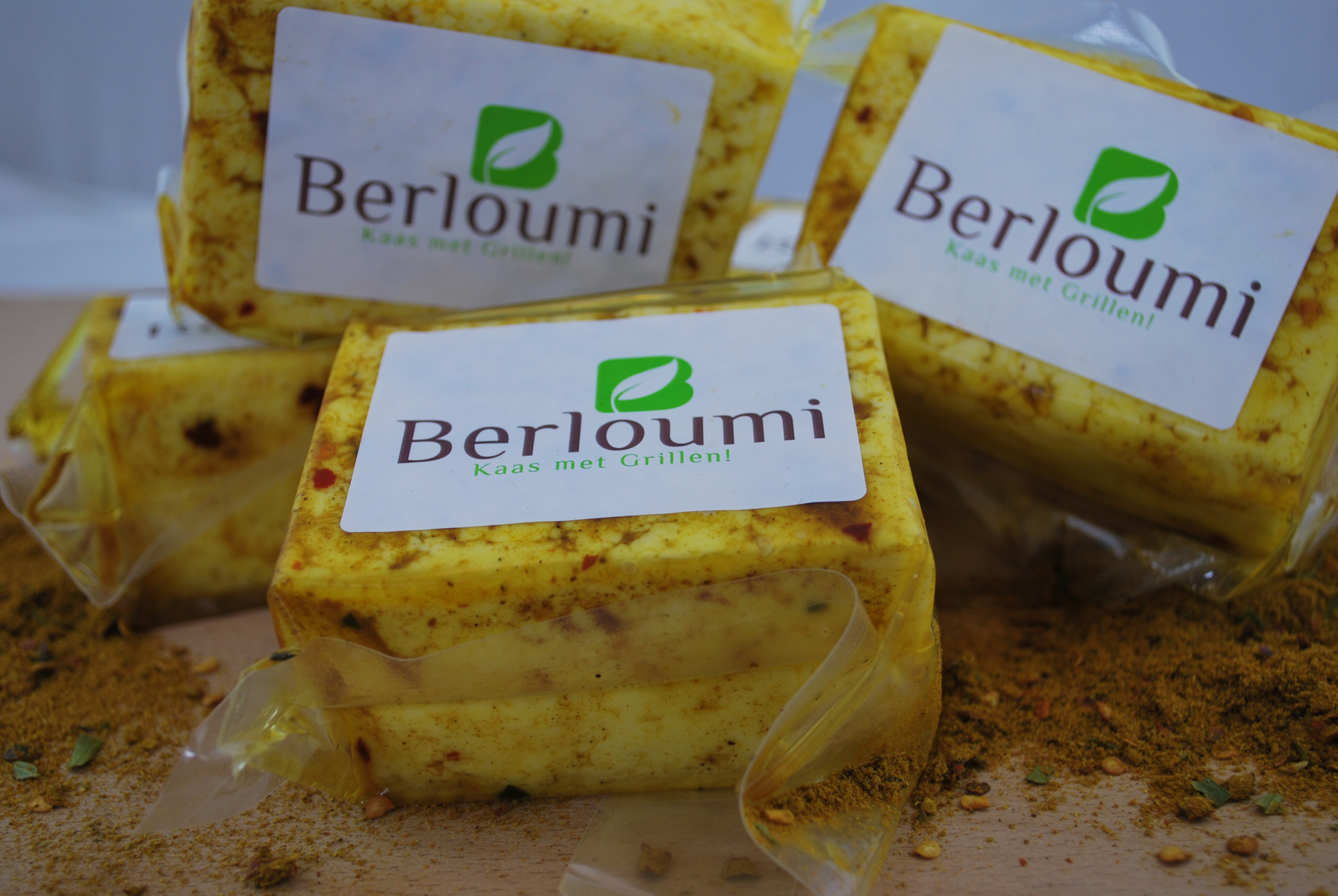 Berloumi is een Belgische grillkaas van het type Halloumi.